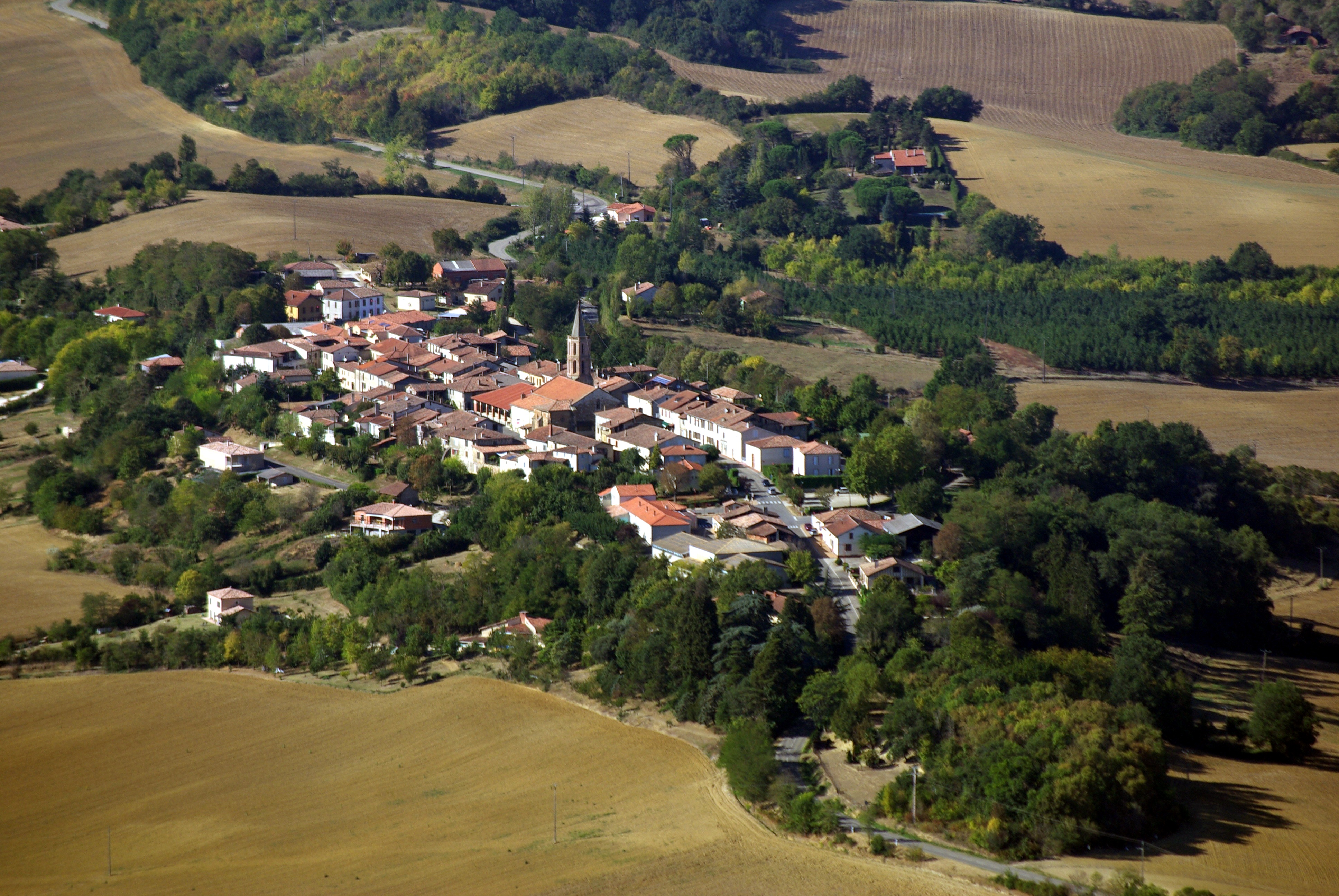 Vue aérienne de Puycasquier.